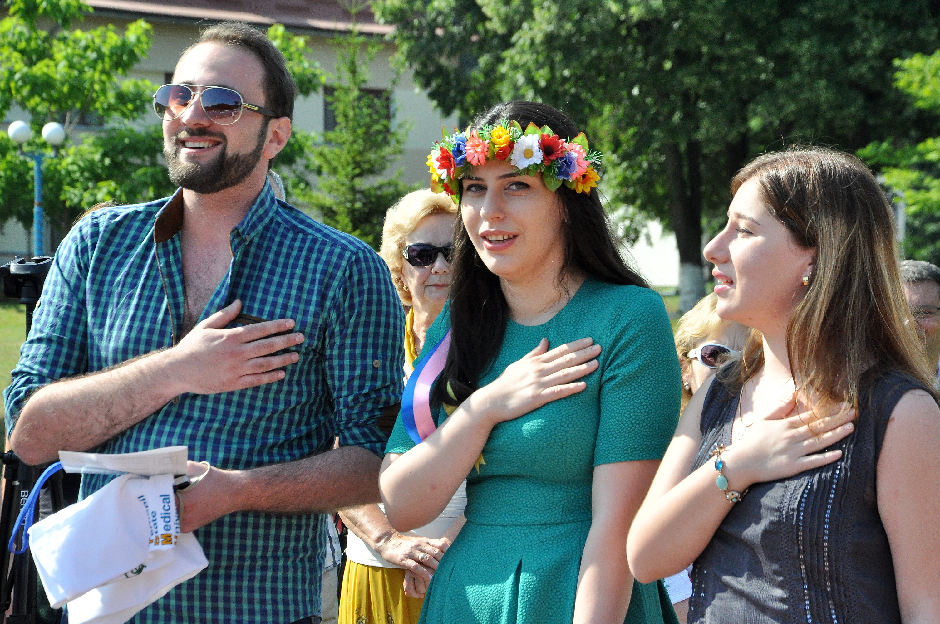 X Літні міжнародні студентські школи в НОК «Червона калина» Тернопільського державного медичного університету імені І. Я. Горбачевського. Гості з Тбіліського державного медичного університету.